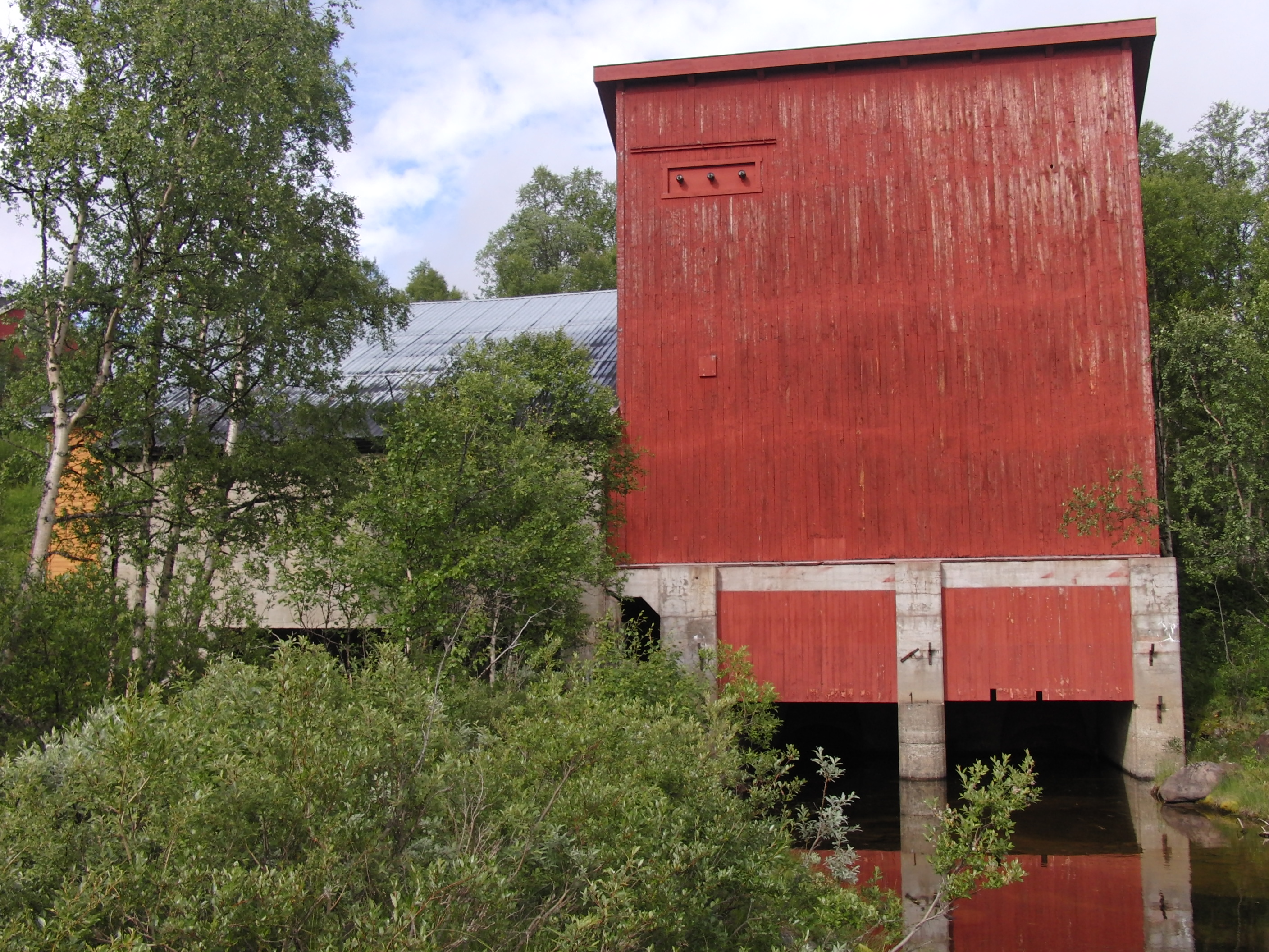 Kuråsfossen I kraftverk